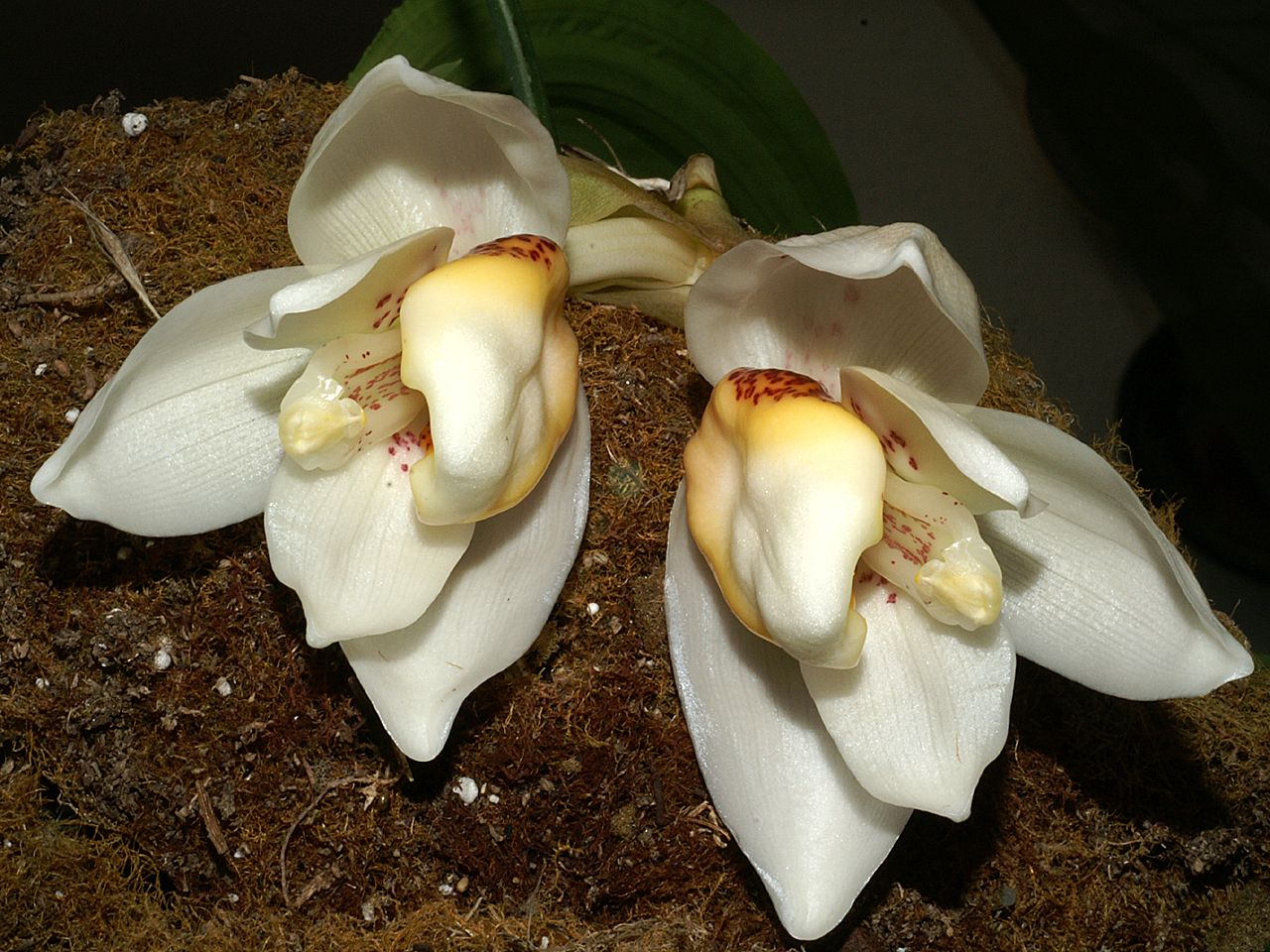 Stanhopea ecornuta